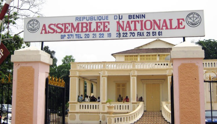 L'Assemblée nationale béninoise à Cotonou, le 21 mars 2019. (VOA/Ginette Fleure Adandé)